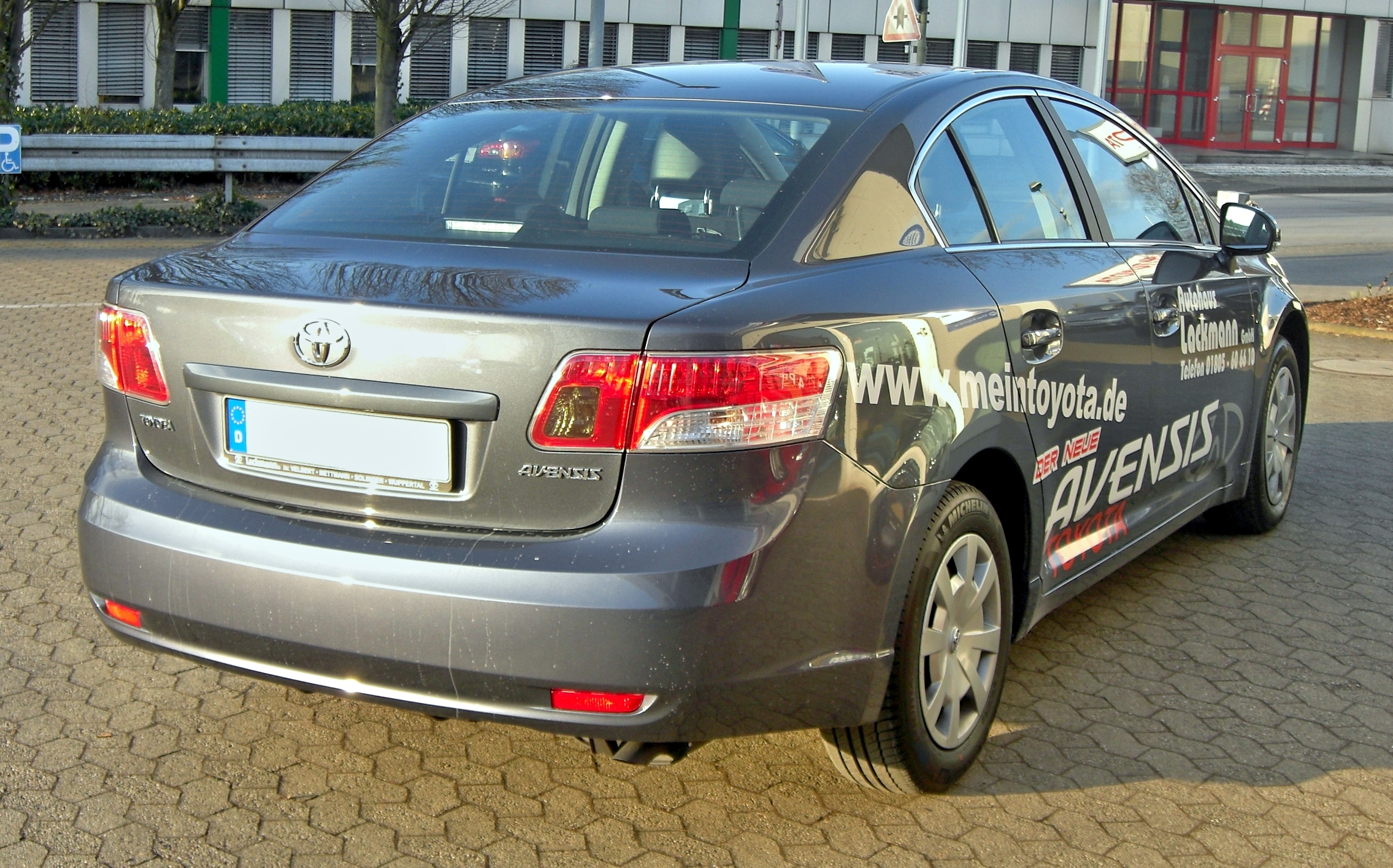 Toyota Avensis